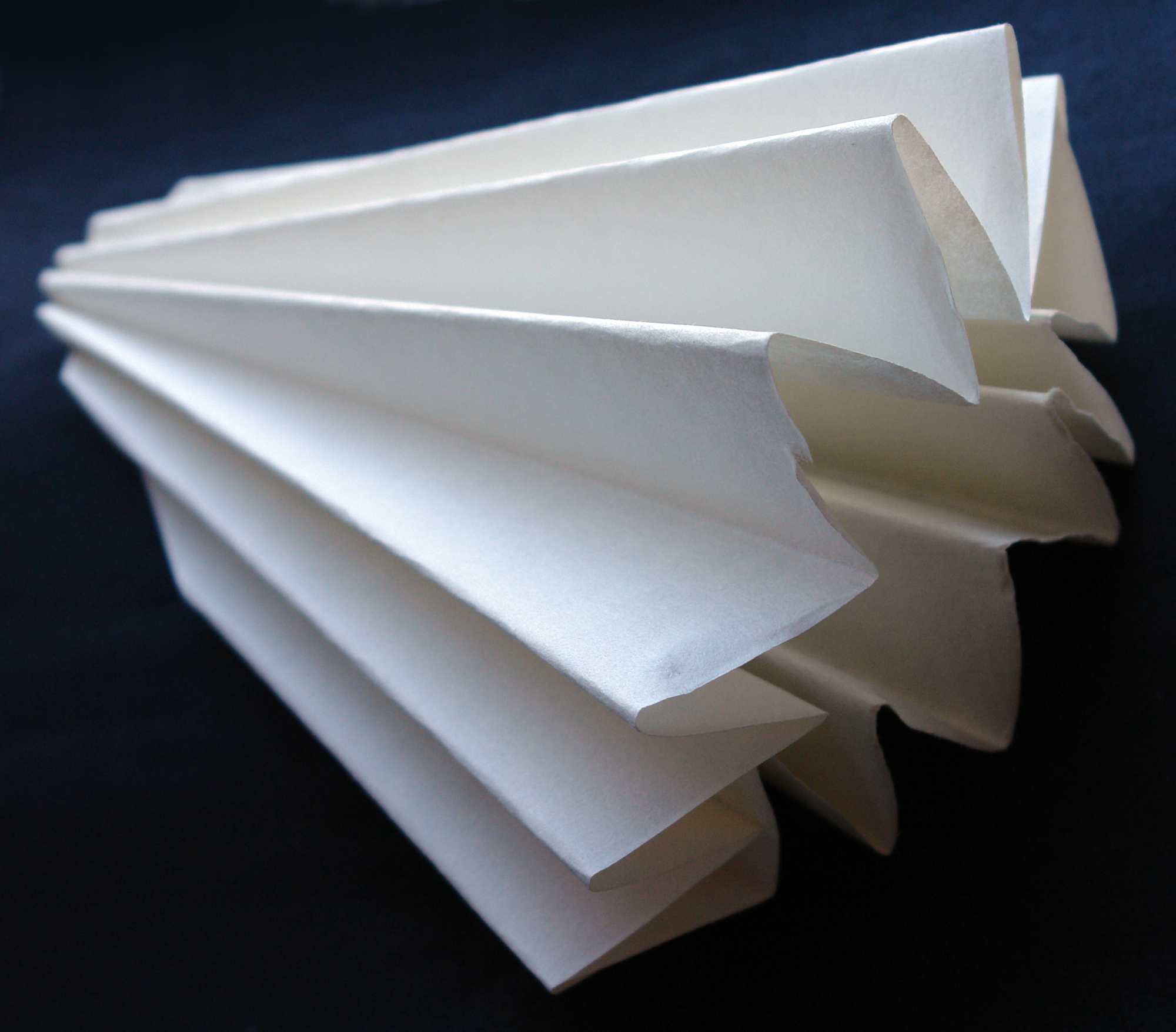 Faltenfilter offen